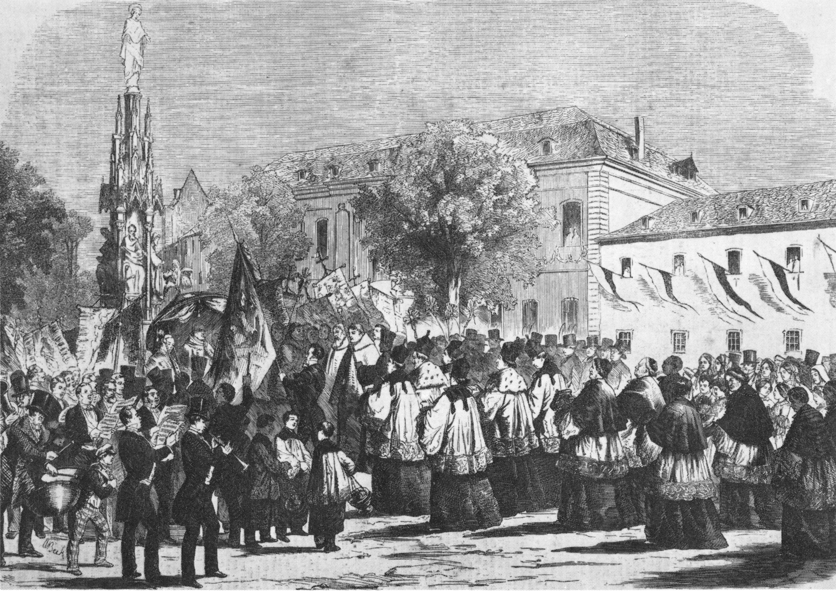 Einweihung der Mariensäule (Köln) am 8. September 1858